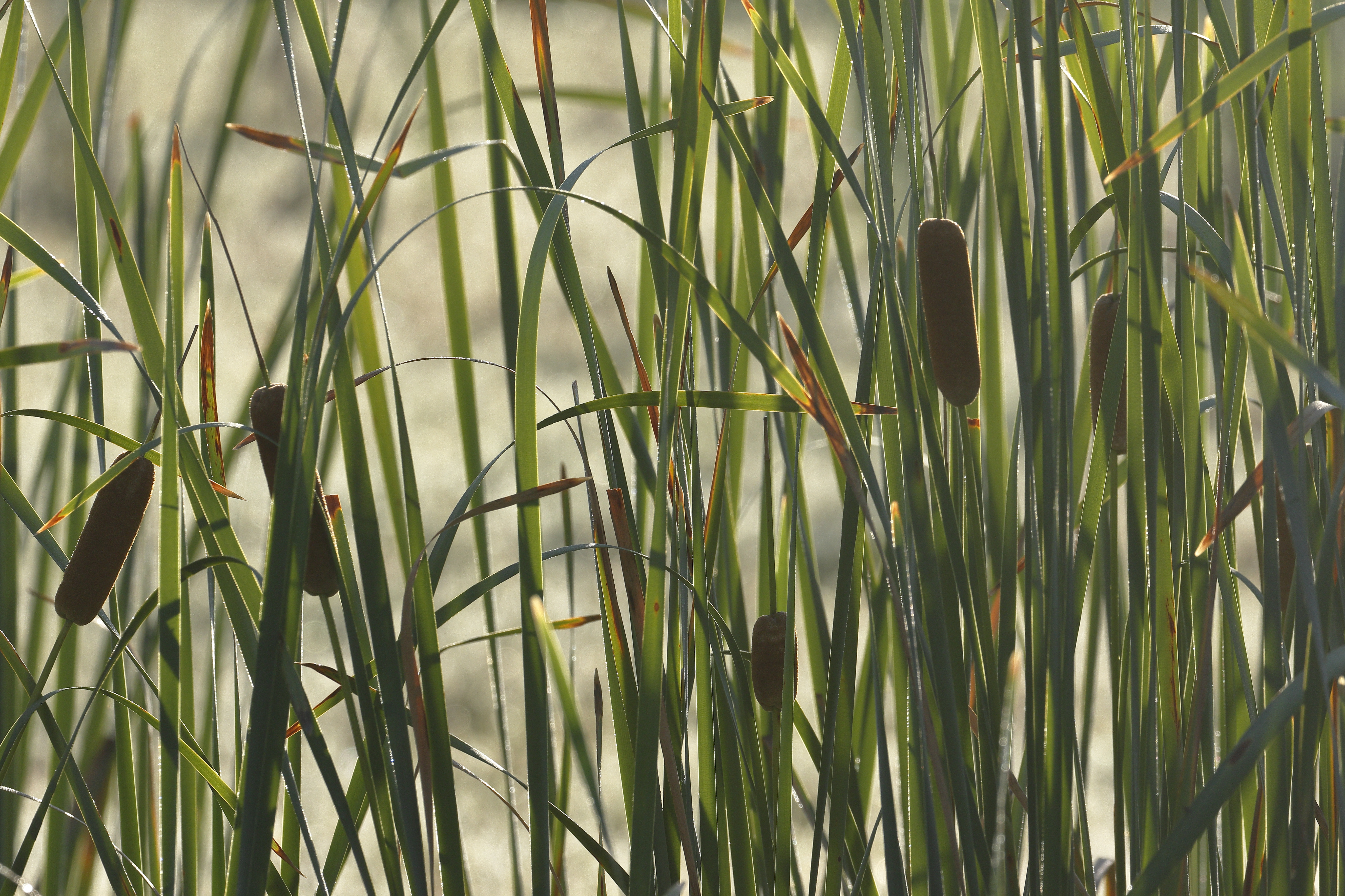 Mullawallah Wetlands, Ballarat.